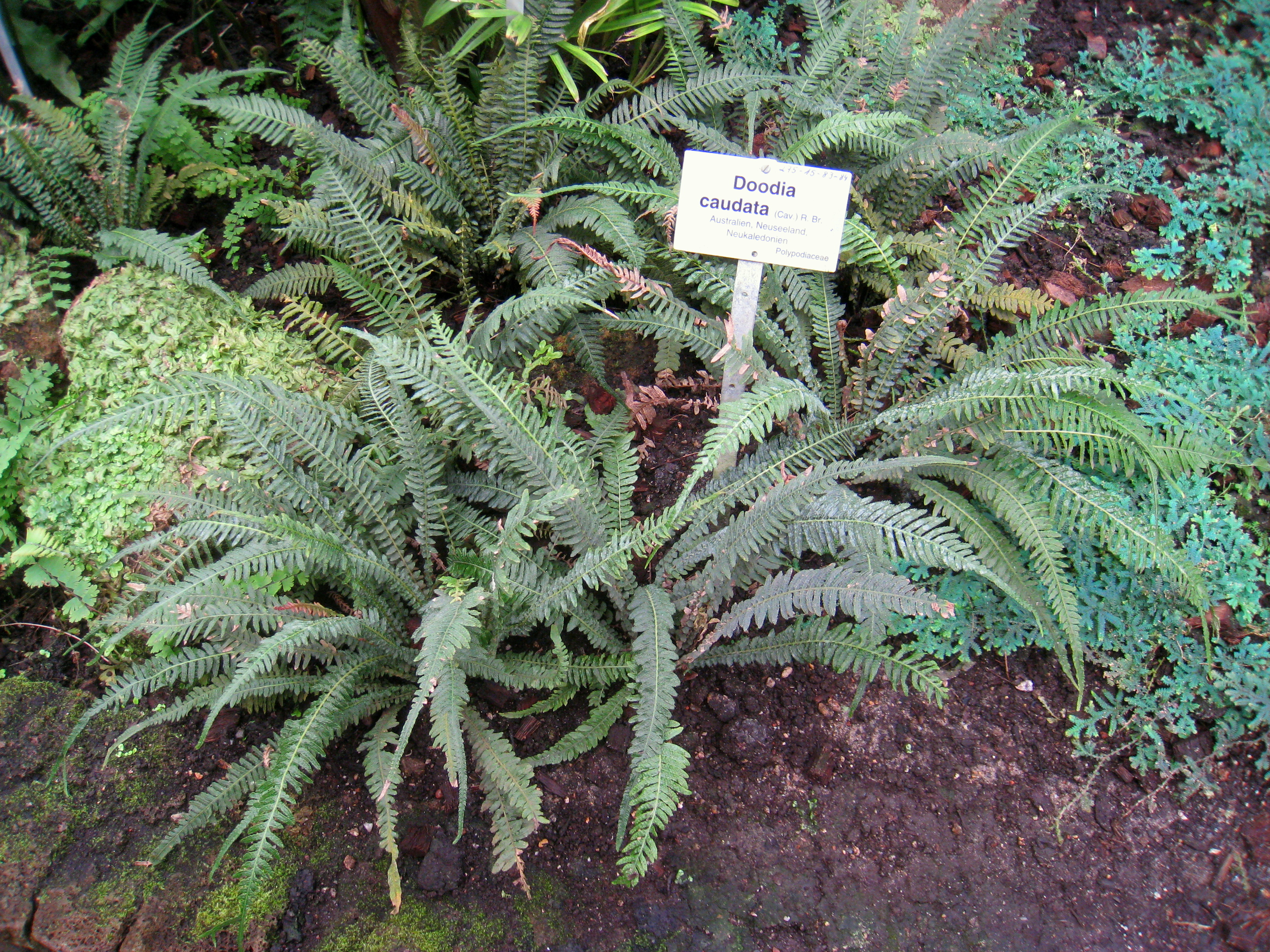 Doodia caudata specimen in the Botanischer Garten, Berlin-Dahlem (Berlin Botanical Garden), Berlin, Germany.